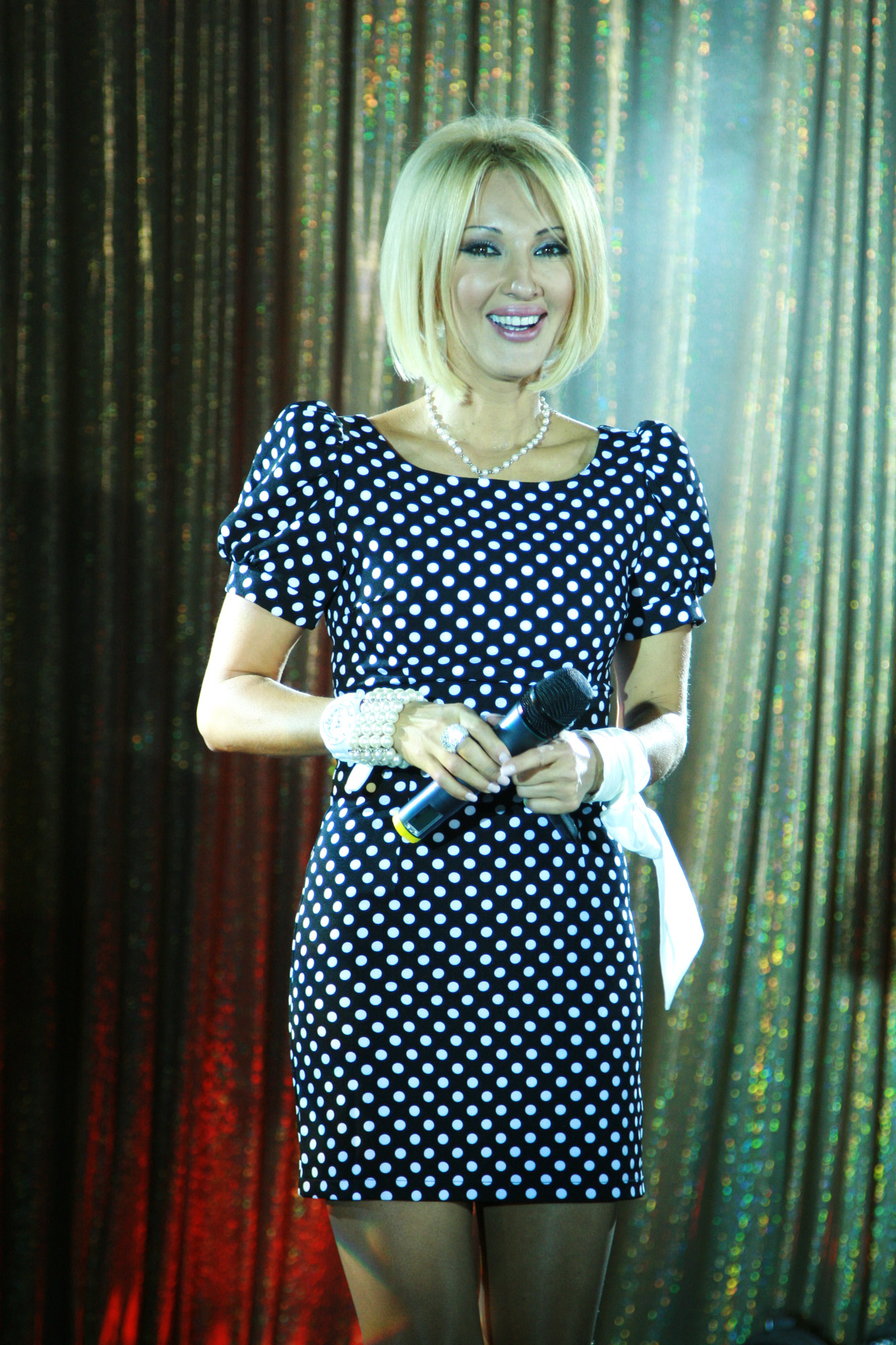 Лера Кудрявцева. Телеведущая. На Top Beauty Awards 2010 в день своего рождения.